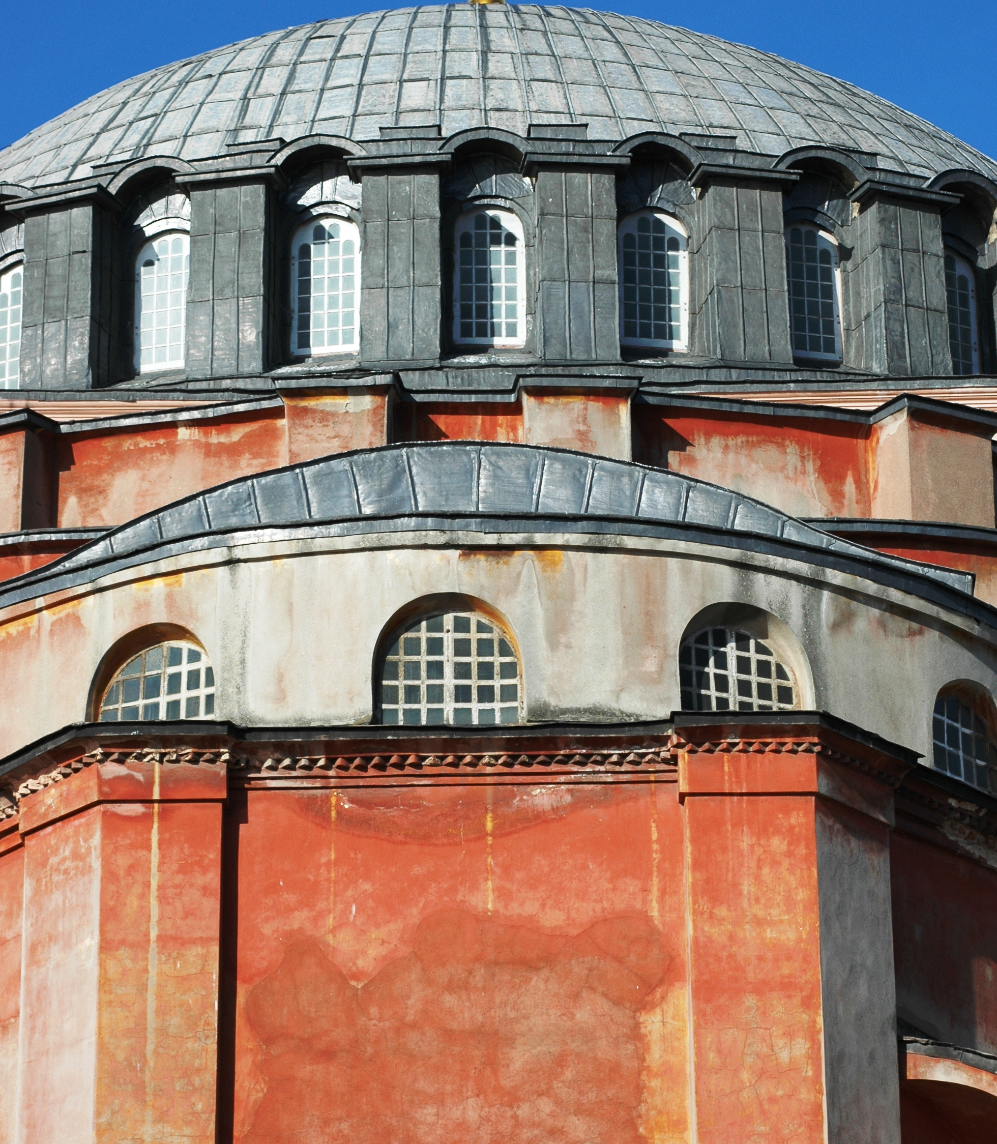 Modificació de Santa Sofia - Cúpula.jpg